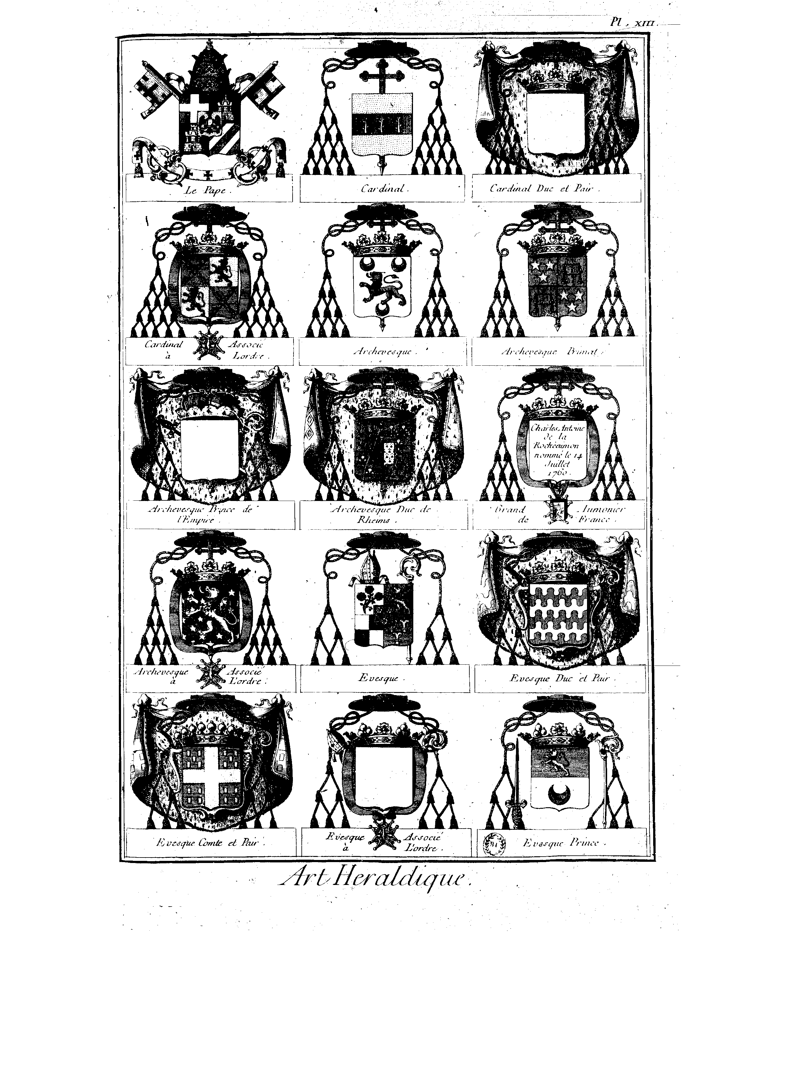 Planches de l'Encyclopédie de Diderot et d'Alembert, volume 2